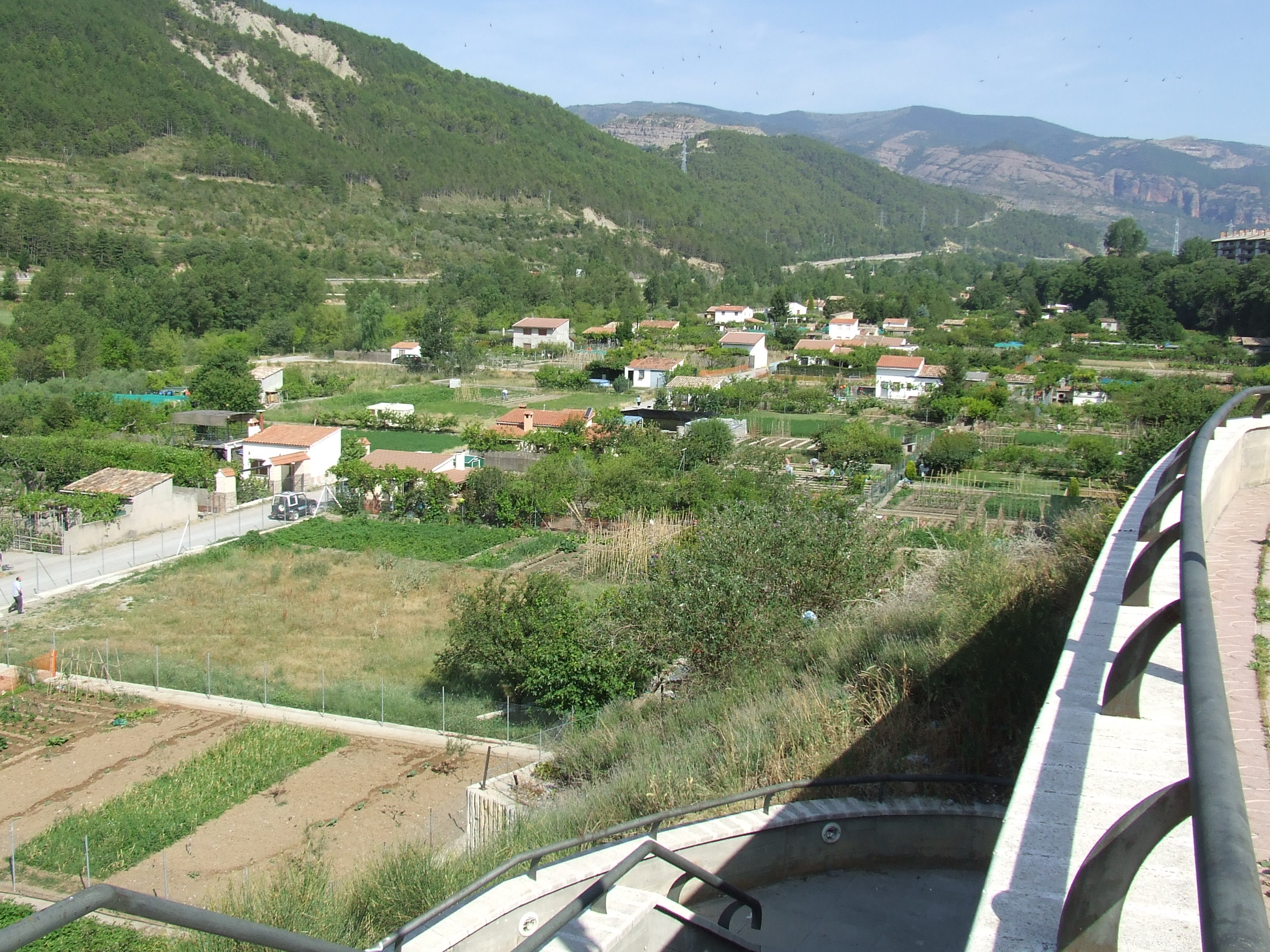 L'Horta de la Font, a la Pobla de Segur, a la vall del Flamisell (Pallars Jussà)